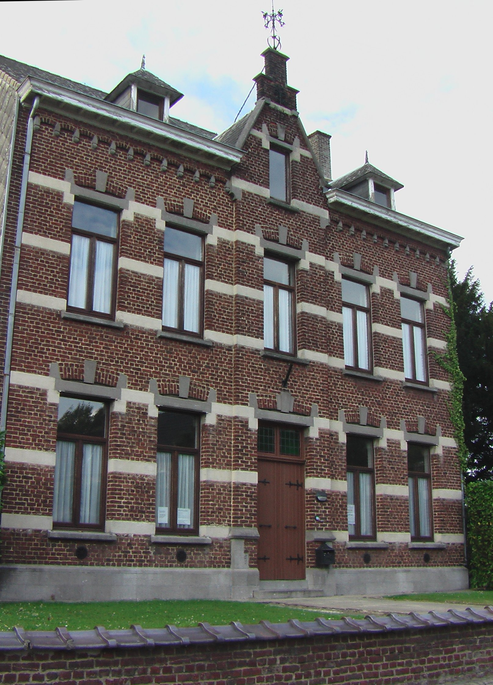 Herenhuis voor de directeur van het pensionaat en het klooster van de Zusters Dienstmaagden van Maria, op het dorpsplein van Erps, gebouwd einde van de negentiende eeuw